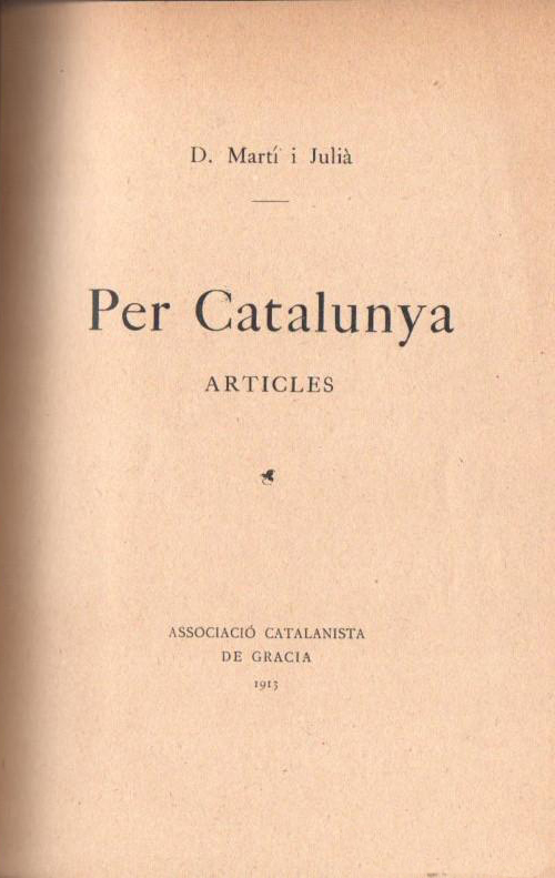 Per Catalunya.